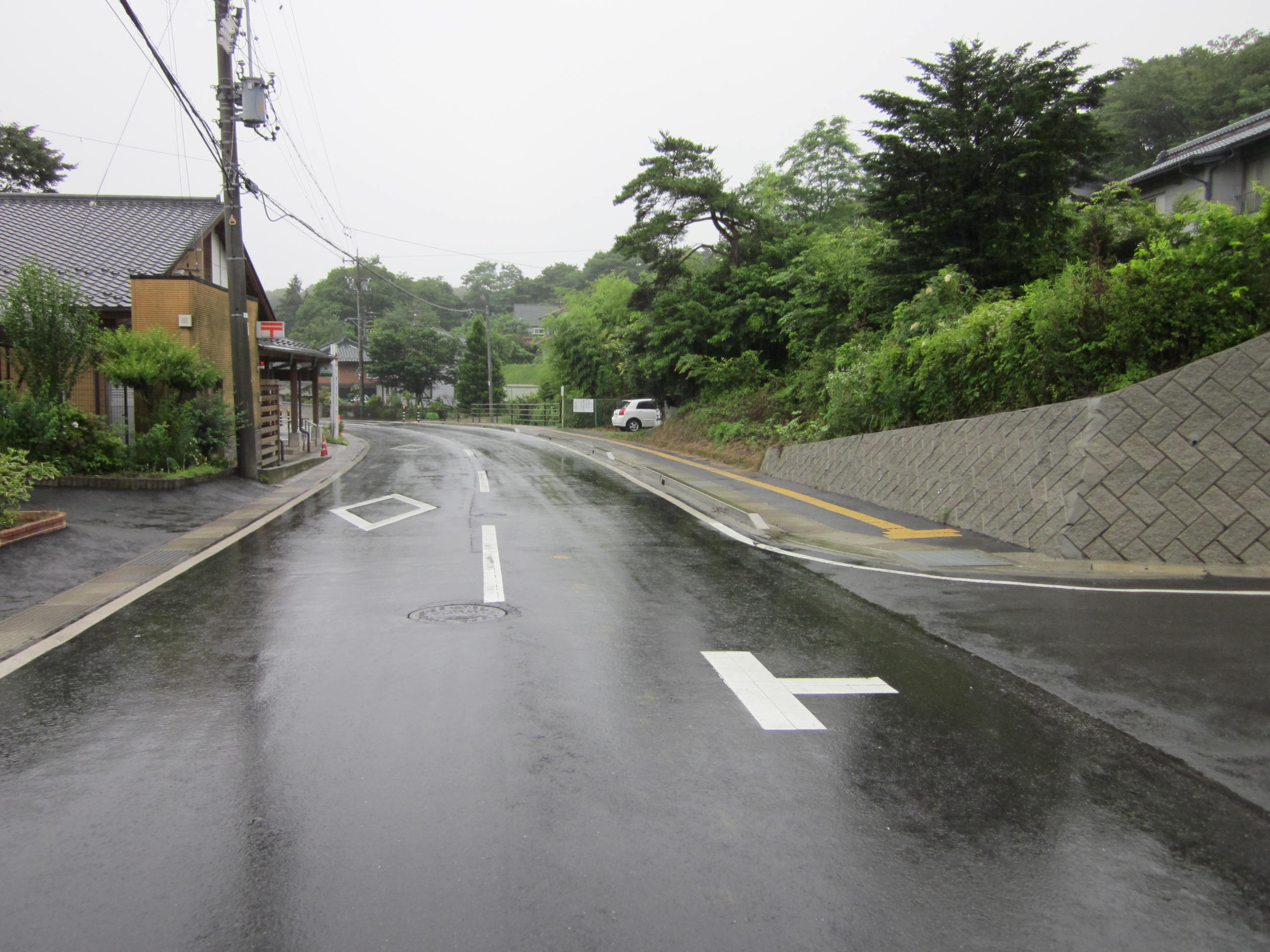 長野県道136号信濃追分停車場線起点（長野県北佐久郡軽井沢町追分）